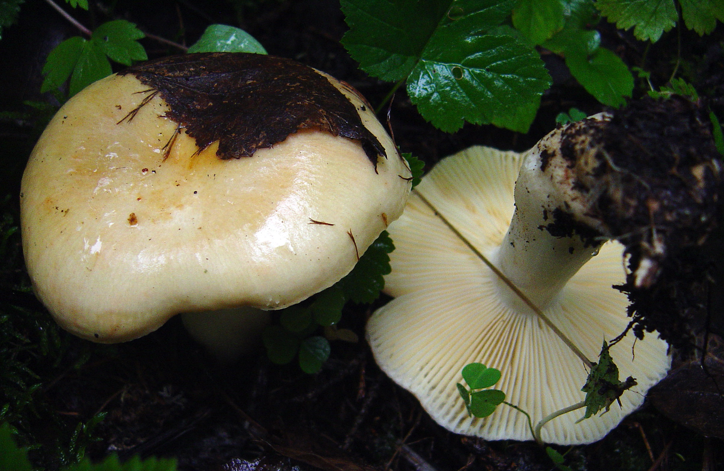 Russula viscida Kudrna